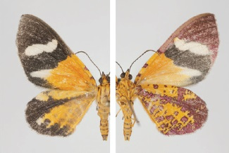 Hagnagora croceitincta